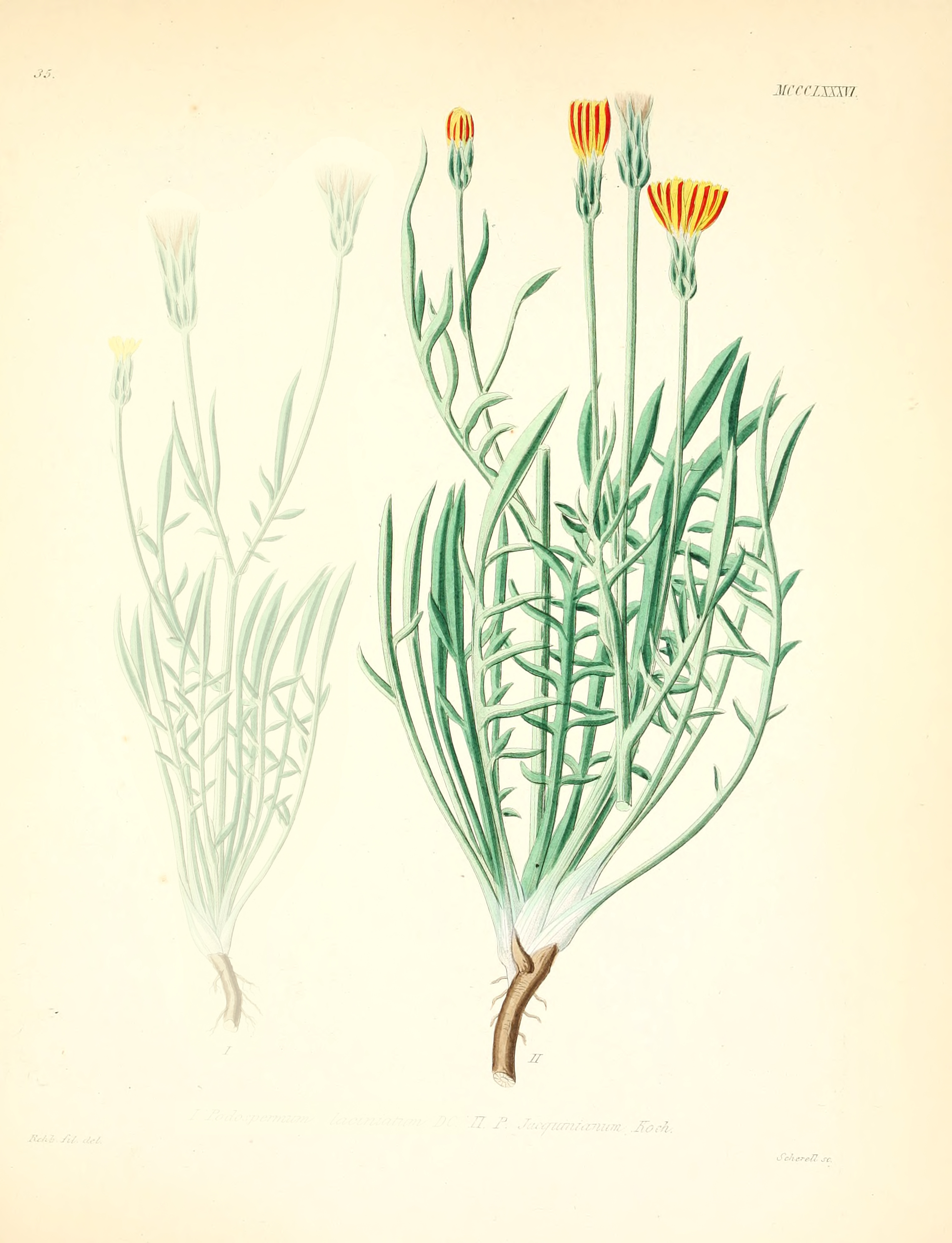 Legende: II Ganze Pflanze.